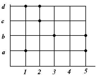 Відповідність між множинами, зображена у вигляді графіку